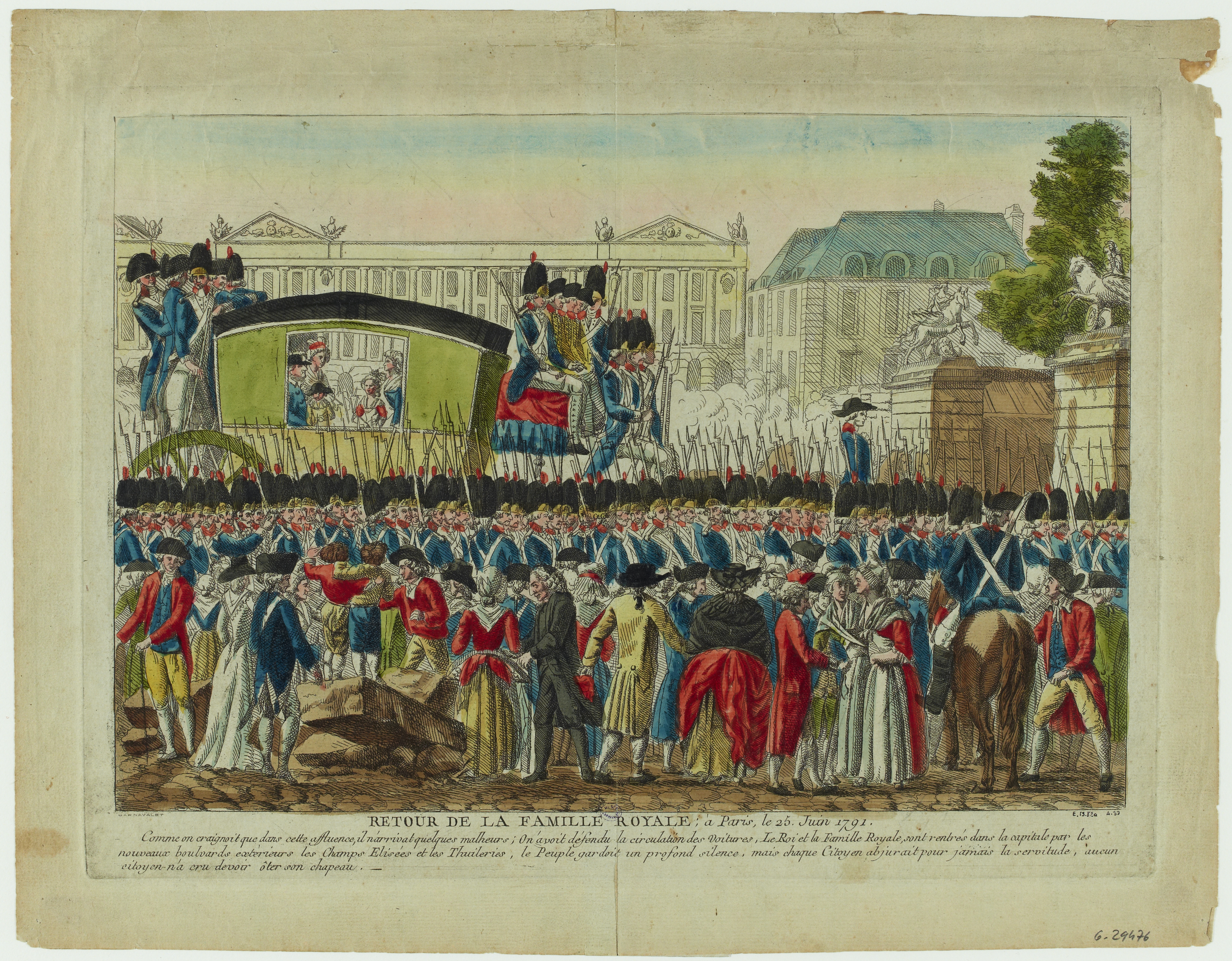 Retour de la famille royale à Paris le 25 juin 1791, après la « fuite à Varennes ». gravure coloriée, Musée Carnavalet, Paris.